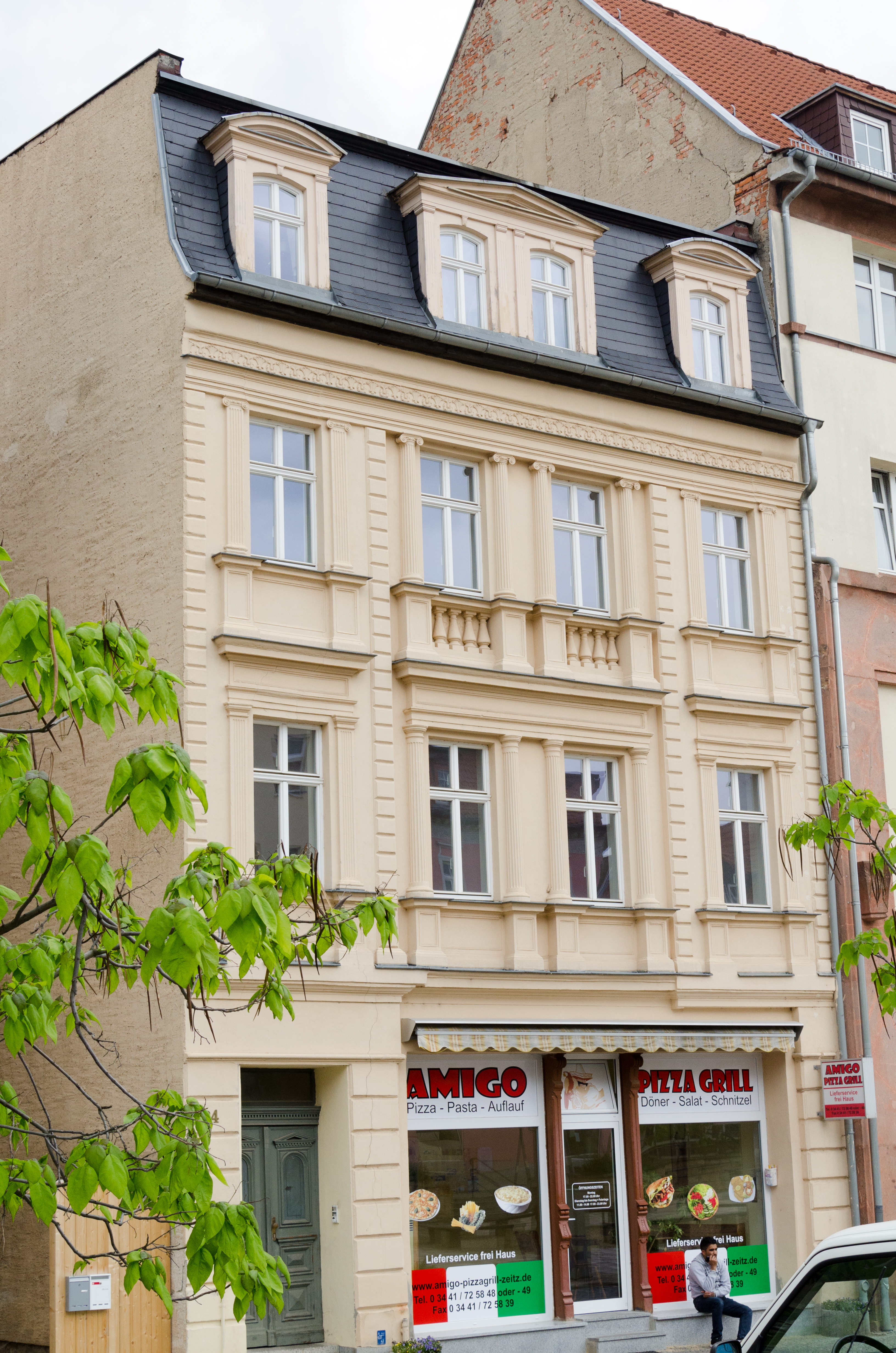 Zeitz, Neumarkt 24